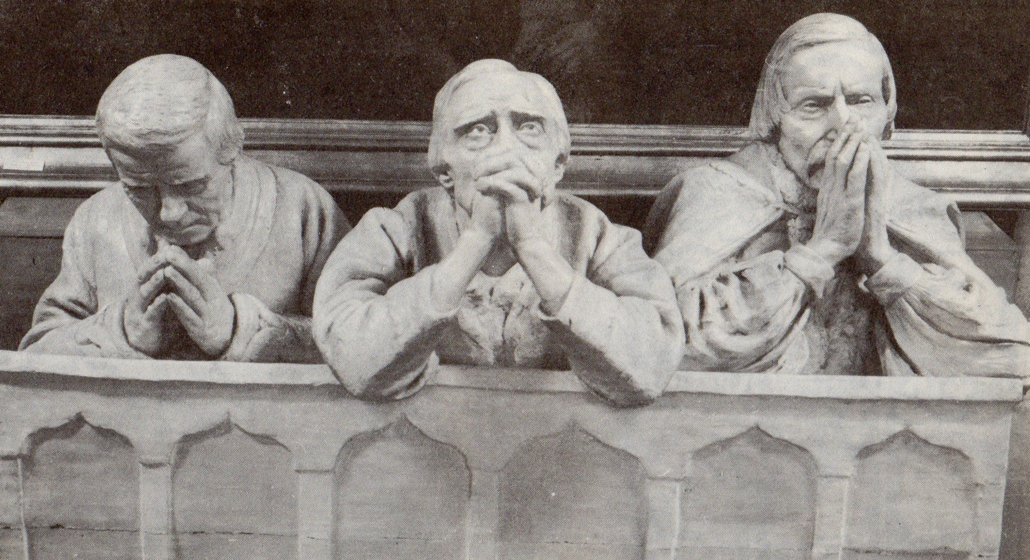 Modlitwa Trzech Stanów. Muz. Archidiecezjalne, Poznań. Autor: Władysław Marcinkowski. Pocz. XX w.